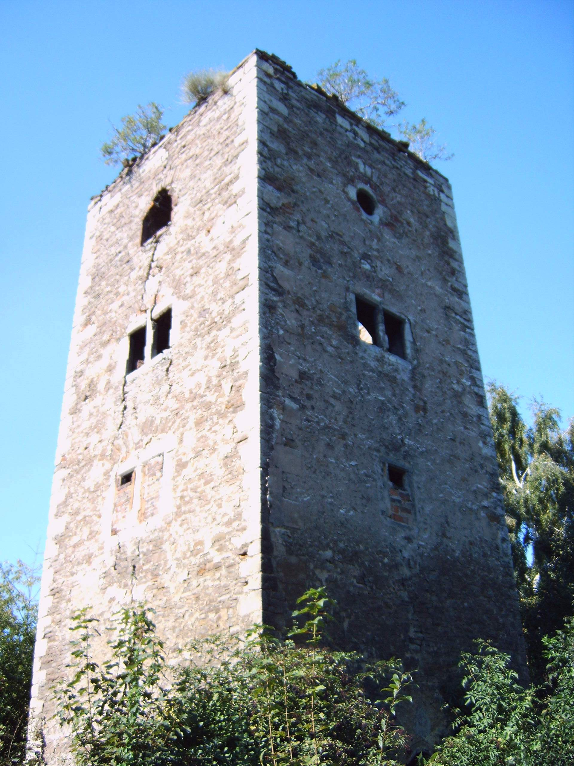 Wohnturm Benneckenbeck, Süd-Ost-Seite, Bild aufgenommen von Olaf2 am 20. September 2005